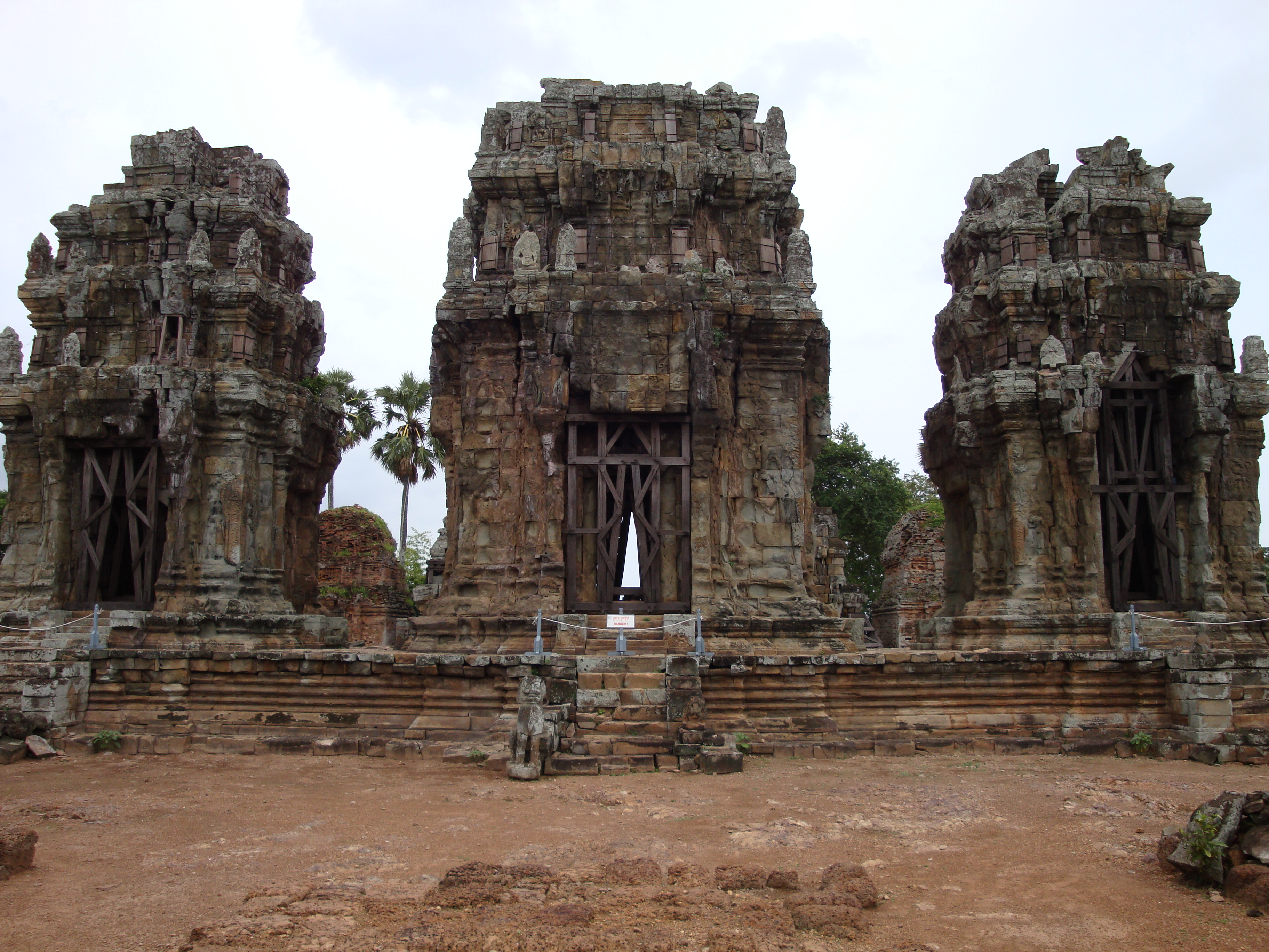 Прасат Пном Краом.